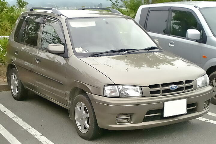 フォード・フェスティバミニワゴン